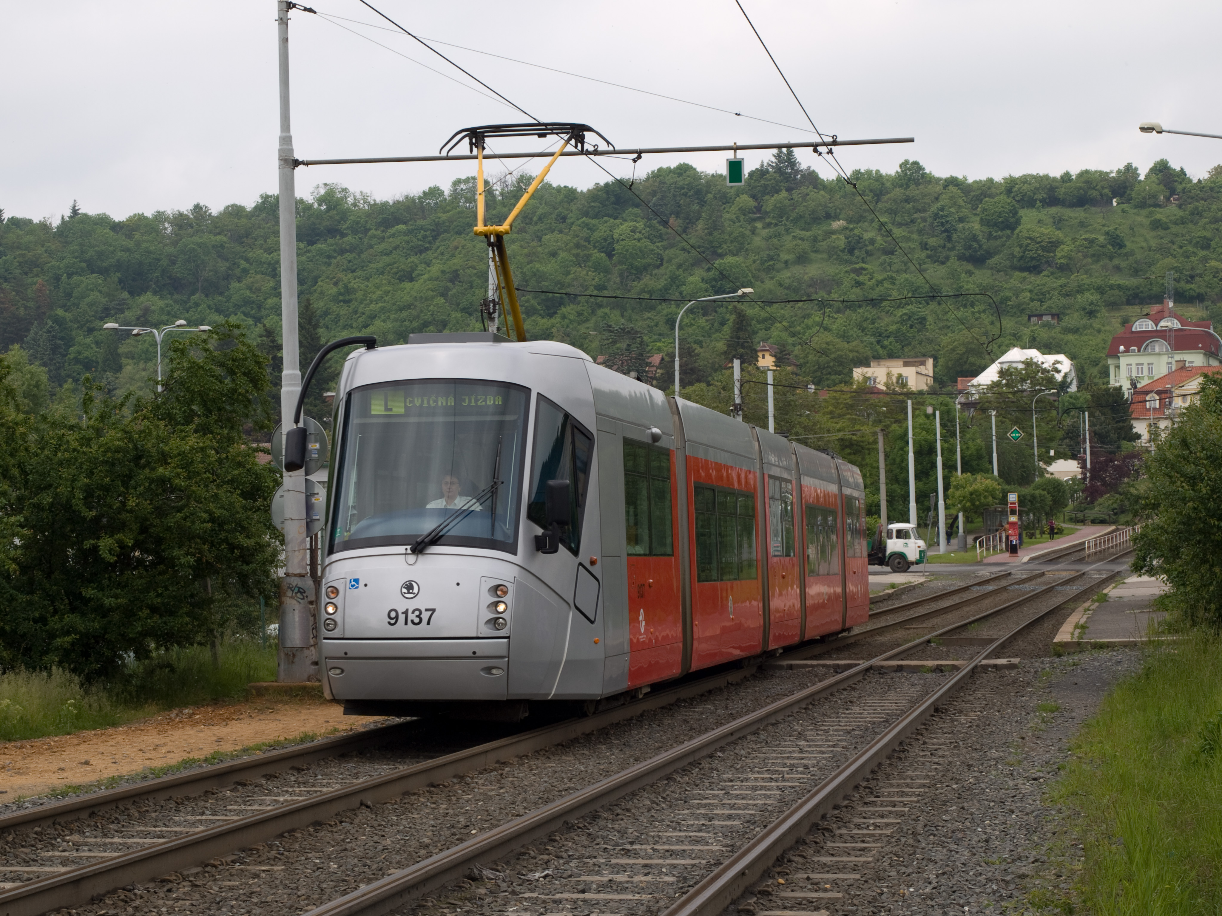 Typ vozu/type: Škoda 14T Evidenční číslo/registration number: 9137 Linka/line: 14 Zastávka(y)/stop(s): Nádraží Hološovice – Trojská Trať/track: Nádraží Hološovice – Ke Stírce